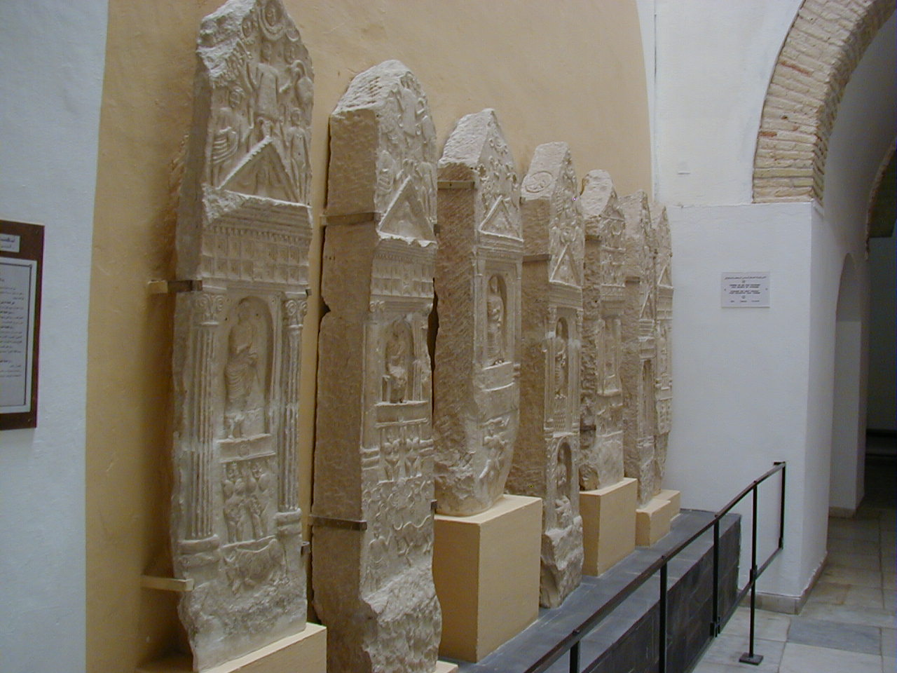 Stèles dites de La Ghorfa au Musée du Bardo, Tunisie